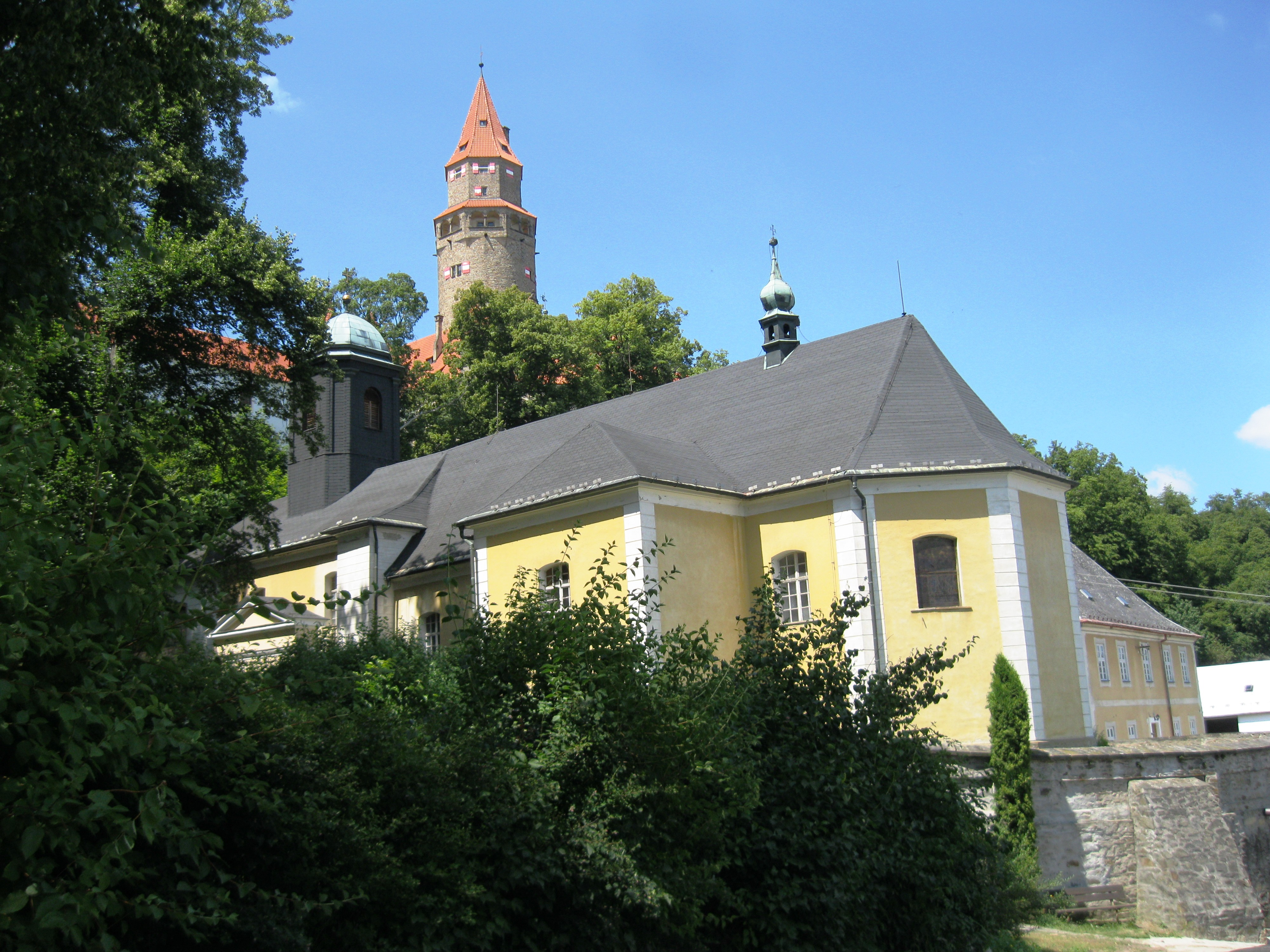 Kostel sv. Gottharda (Bouzov), ve středu obce npod hradem, Bouzov